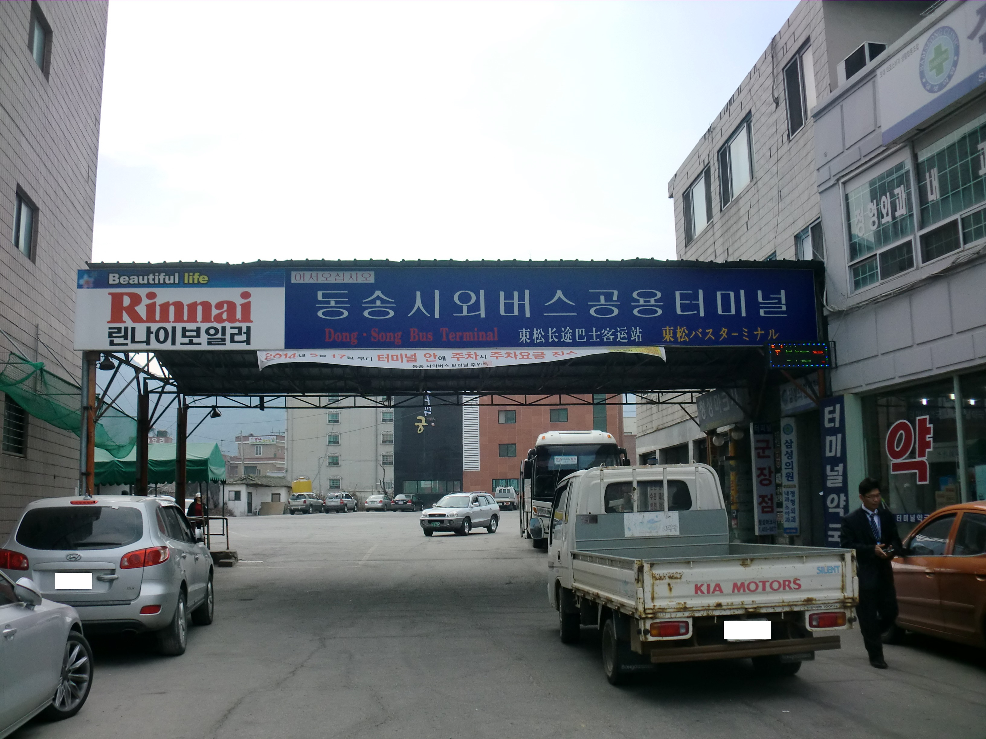 강원도 철원군에 있는 동송버스터미널